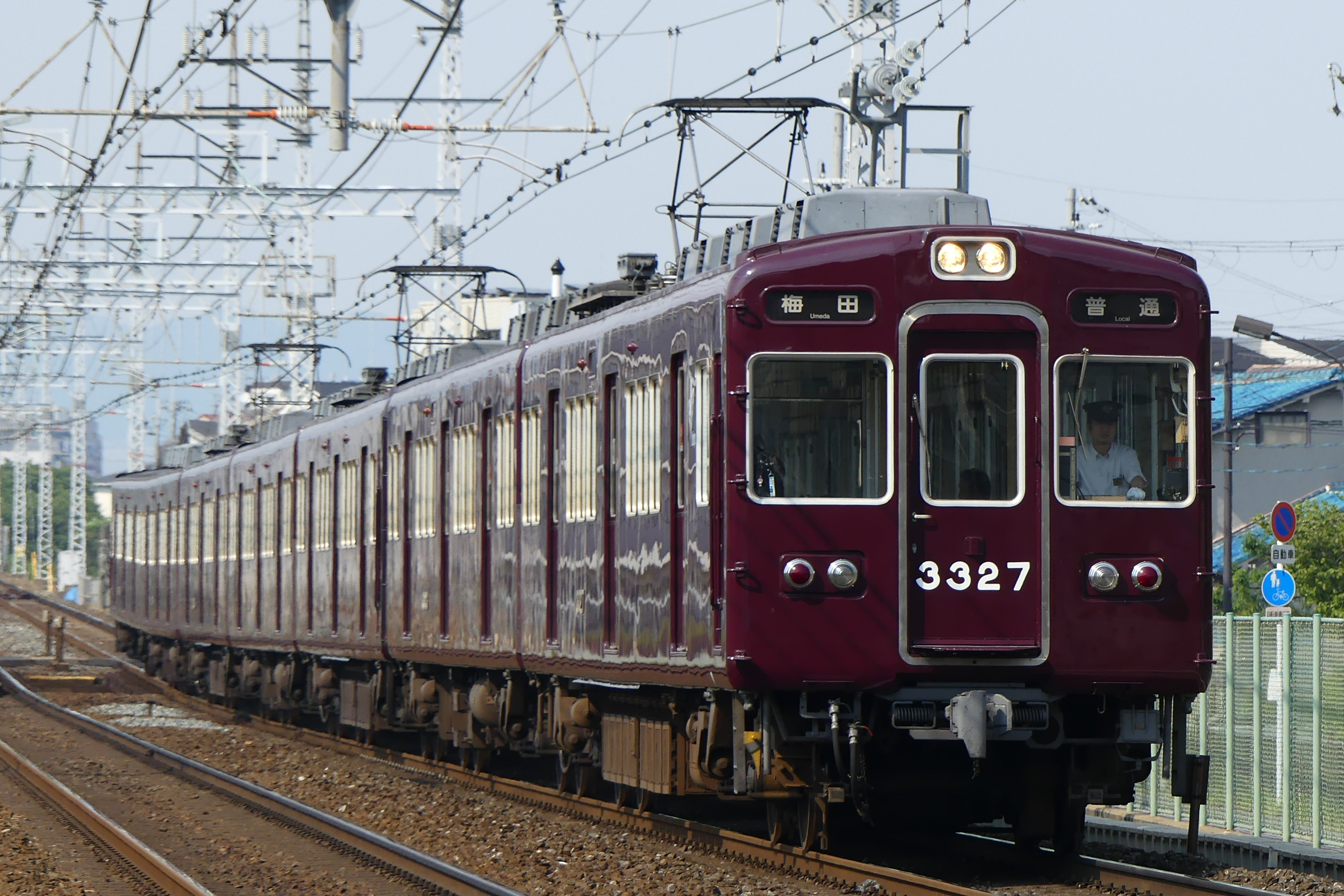 阪急電鉄3300系電車